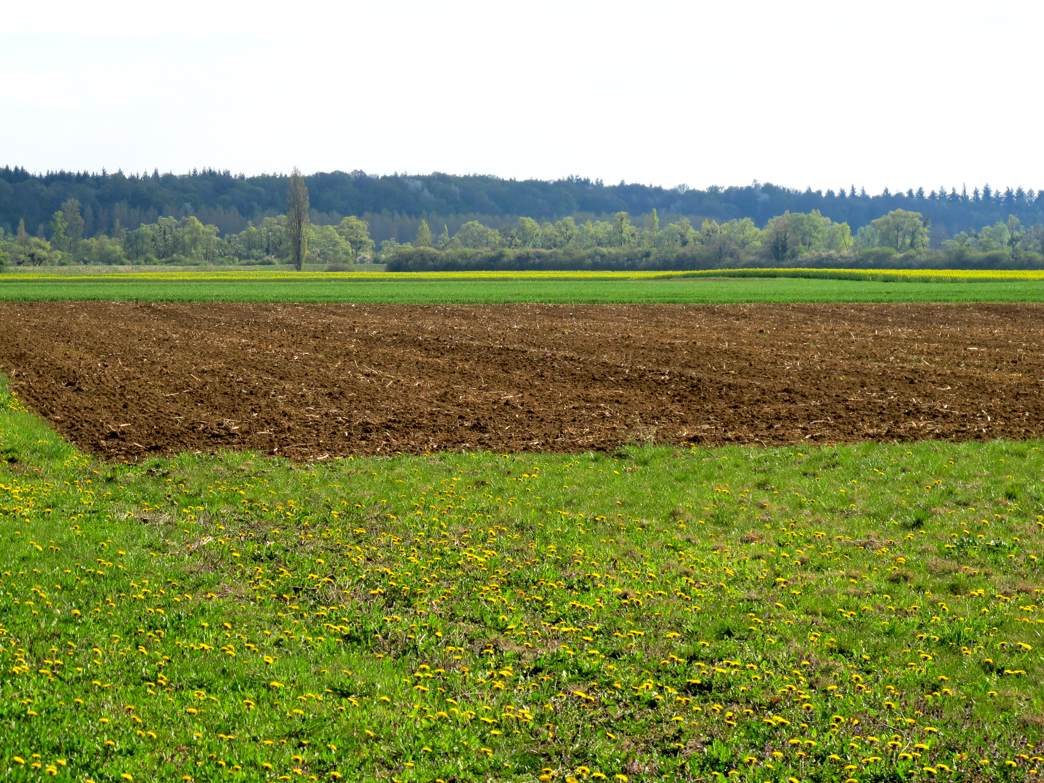 Le Finage dolois rejoint la Bresse Comtoise. Le Doubs les sépare.